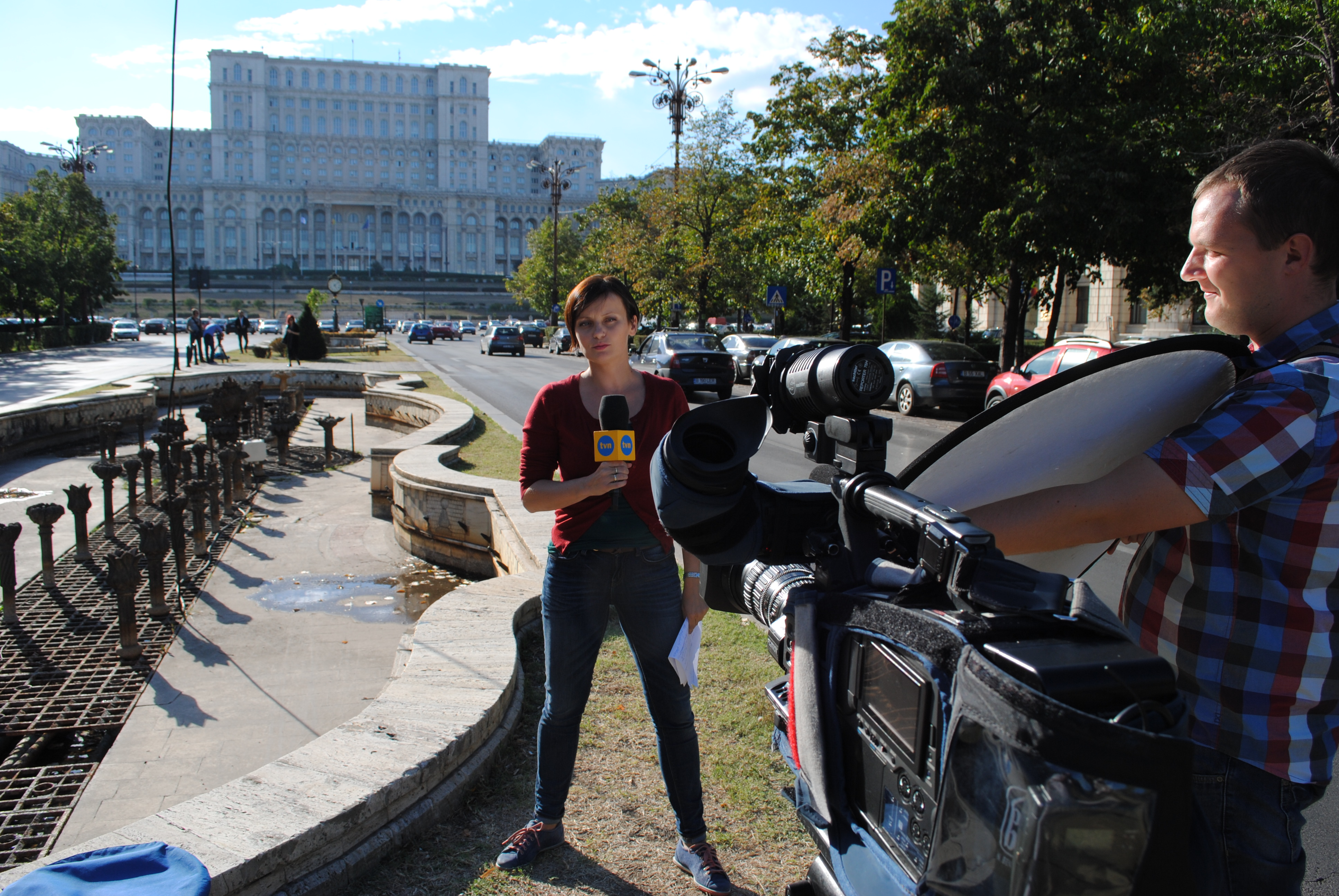 Renata Kijowska – polska dziennikarka radiowa i telewizyjna, reporterka "Faktów" TVN.